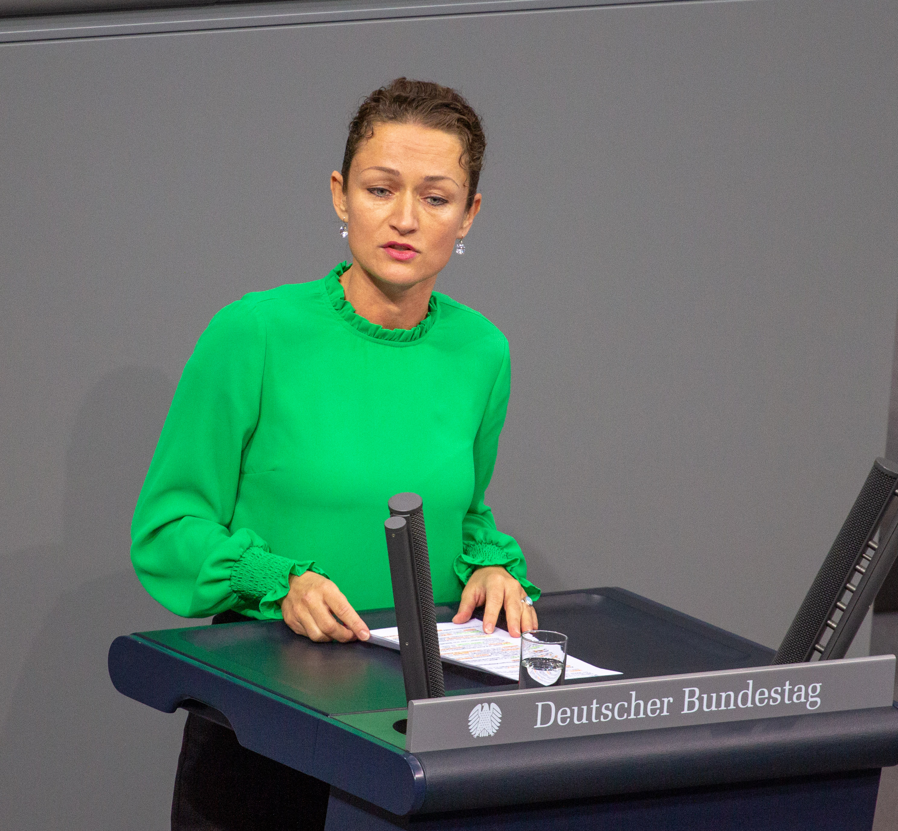 Zaklin Nastic, Mitglied des Deutschen Bundestages, während einer Plenarsitzung am 11. April 2019 in Berlin.